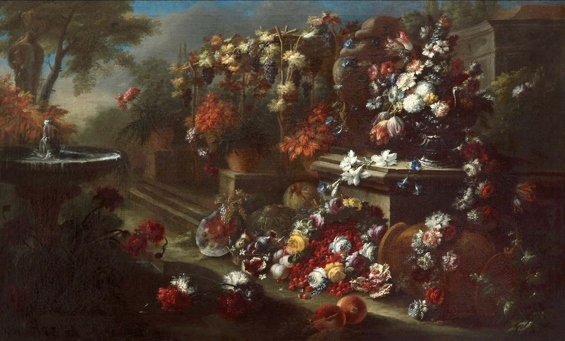 Bodegón con flores y frutas, óleo sobre lienzo, 74,5 x 125,8 cm, Madrid, galería Concha Barrios